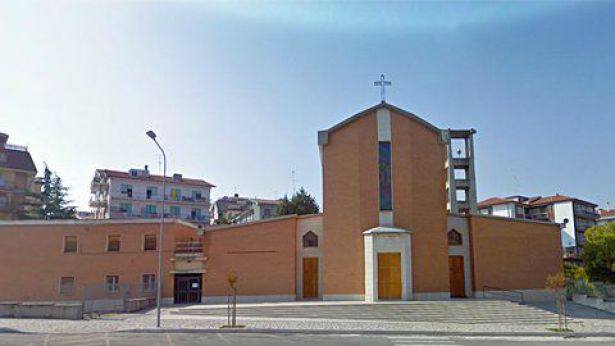 Facciata e locali parrocchiali.